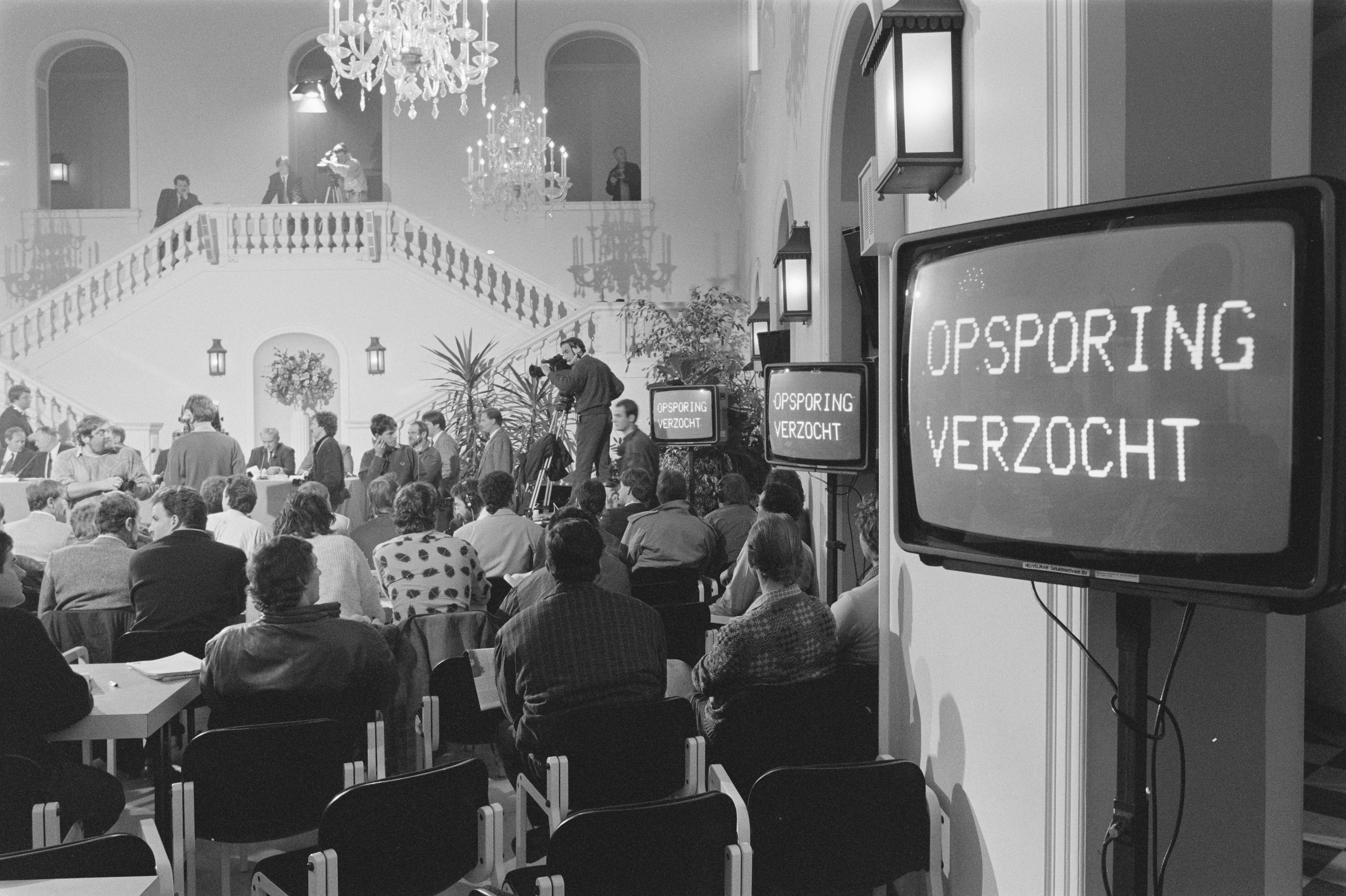 Collectie / Archief : Fotocollectie Anefo Reportage / Serie : [ onbekend ] Beschrijving : Persconferentie i.v.m. ontvoering Gerrit Jan Heijn in gemeentehuis Bloemendaal met tv-programma "Opsporing Verzocht" Datum : 28 december 1987 Locatie : Bloemendaal, Noord-Holland Trefwoorden : gemeentehuizen, persconferenties Fotograaf : Croes, Rob C. / Anefo Auteursrechthebbende : Nationaal Archief Materiaalsoort : Negatief (zwart/wit) Nummer archiefinventaris : bekijk toegang 2.24.01.05 Bestanddeelnummer : 934-1576